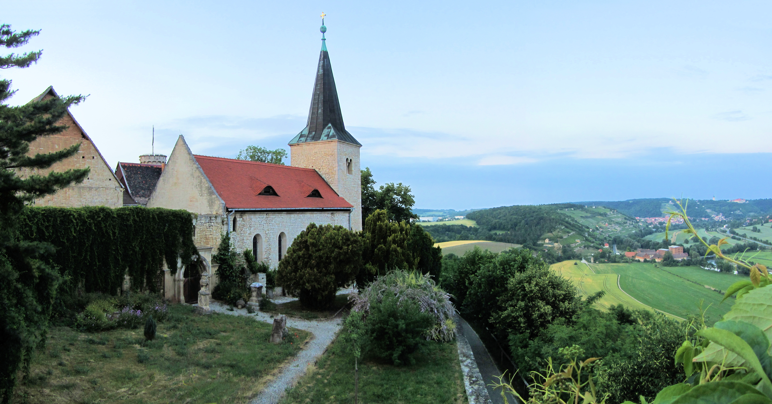 Klosterkirche Zscheiplitz, Blick nach Freyburg (Unstrut) mit Schloss Neuenburg, Abendstimmung